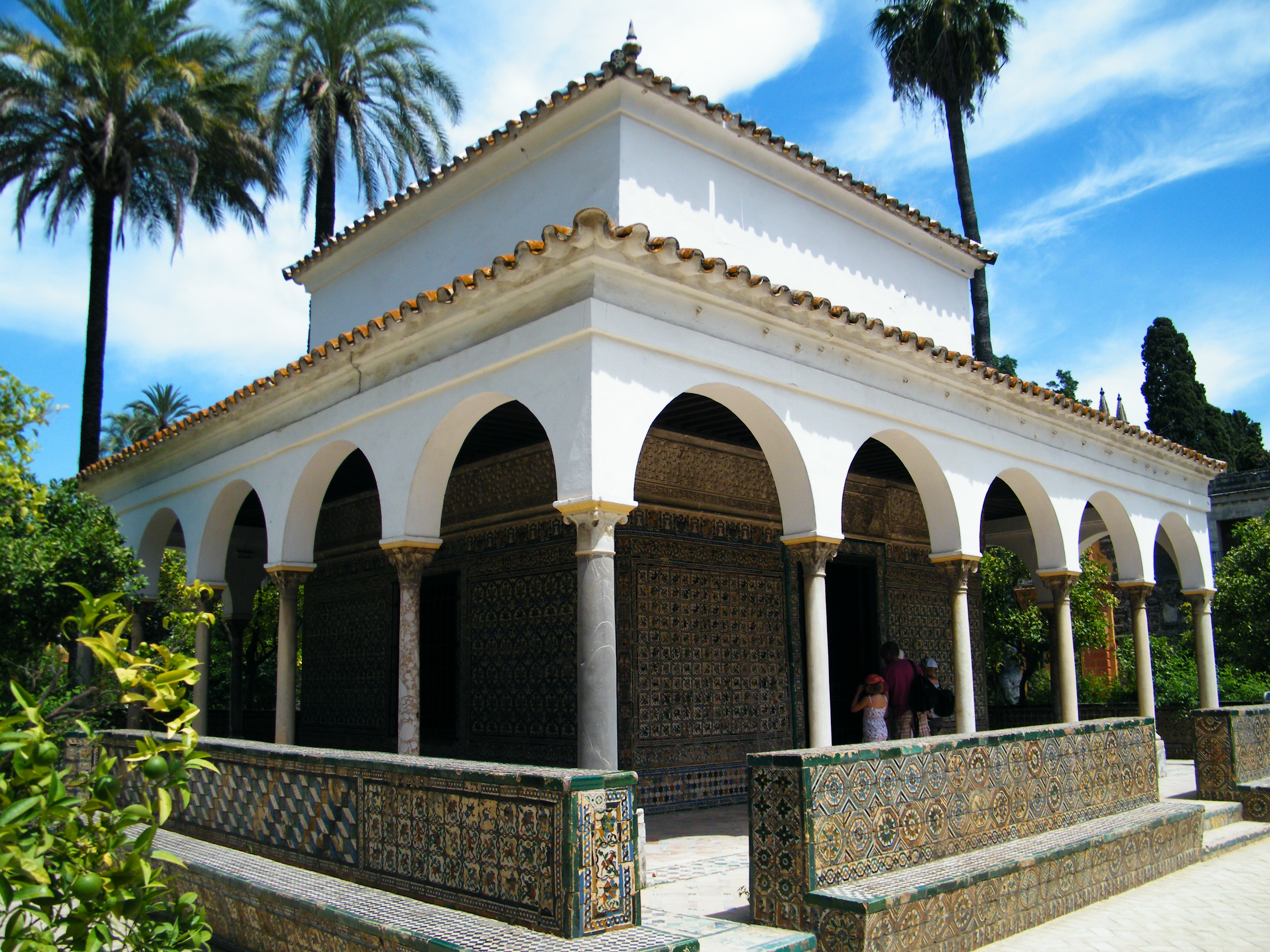 JARDINES DE LOS REALES ALCÁZARES DE SEVILLA. CEDNADOR DE LA ALCOBA.